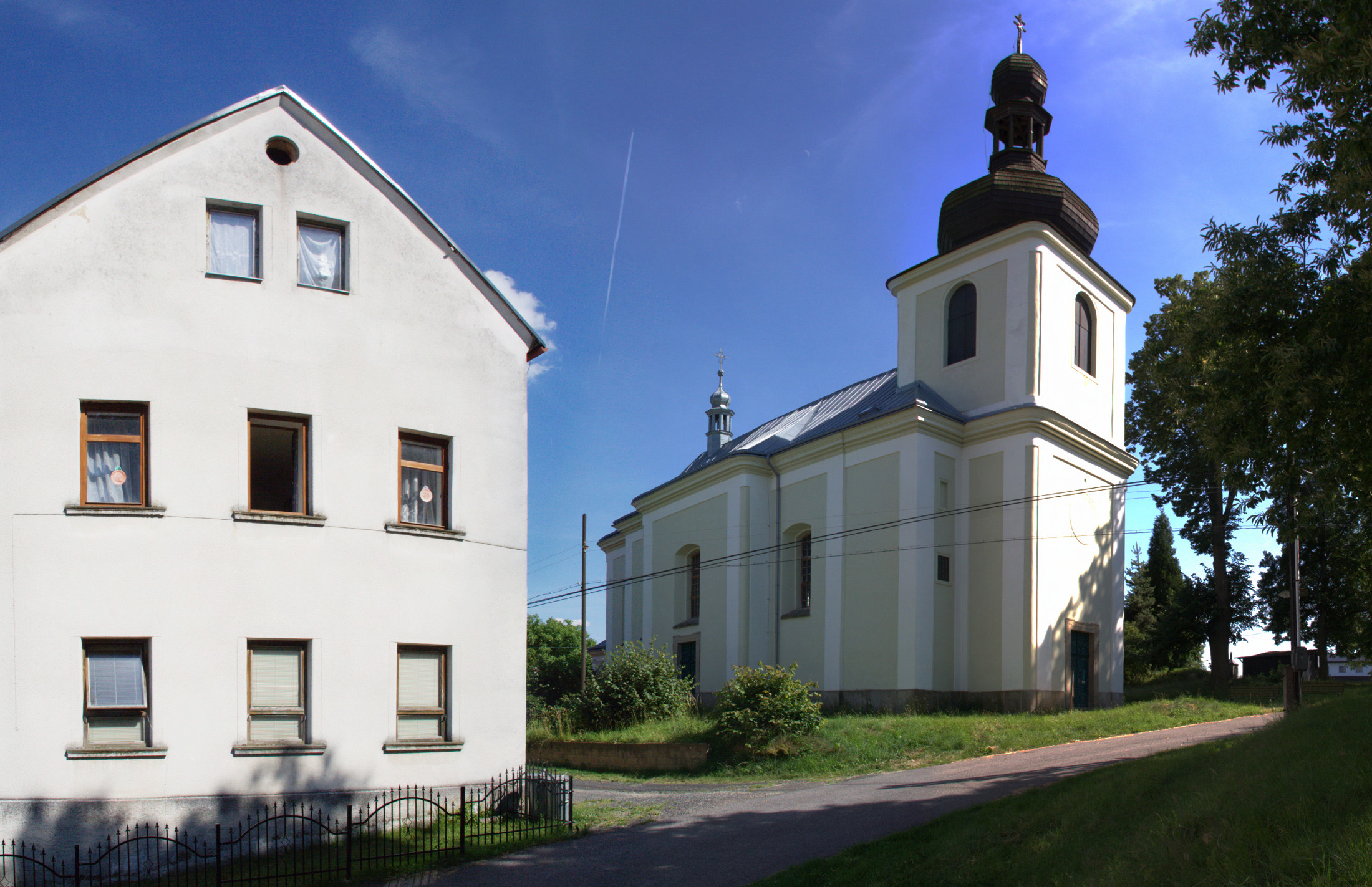 Kostel svatého Linharta s farou, Hlavice (okres Liberec).